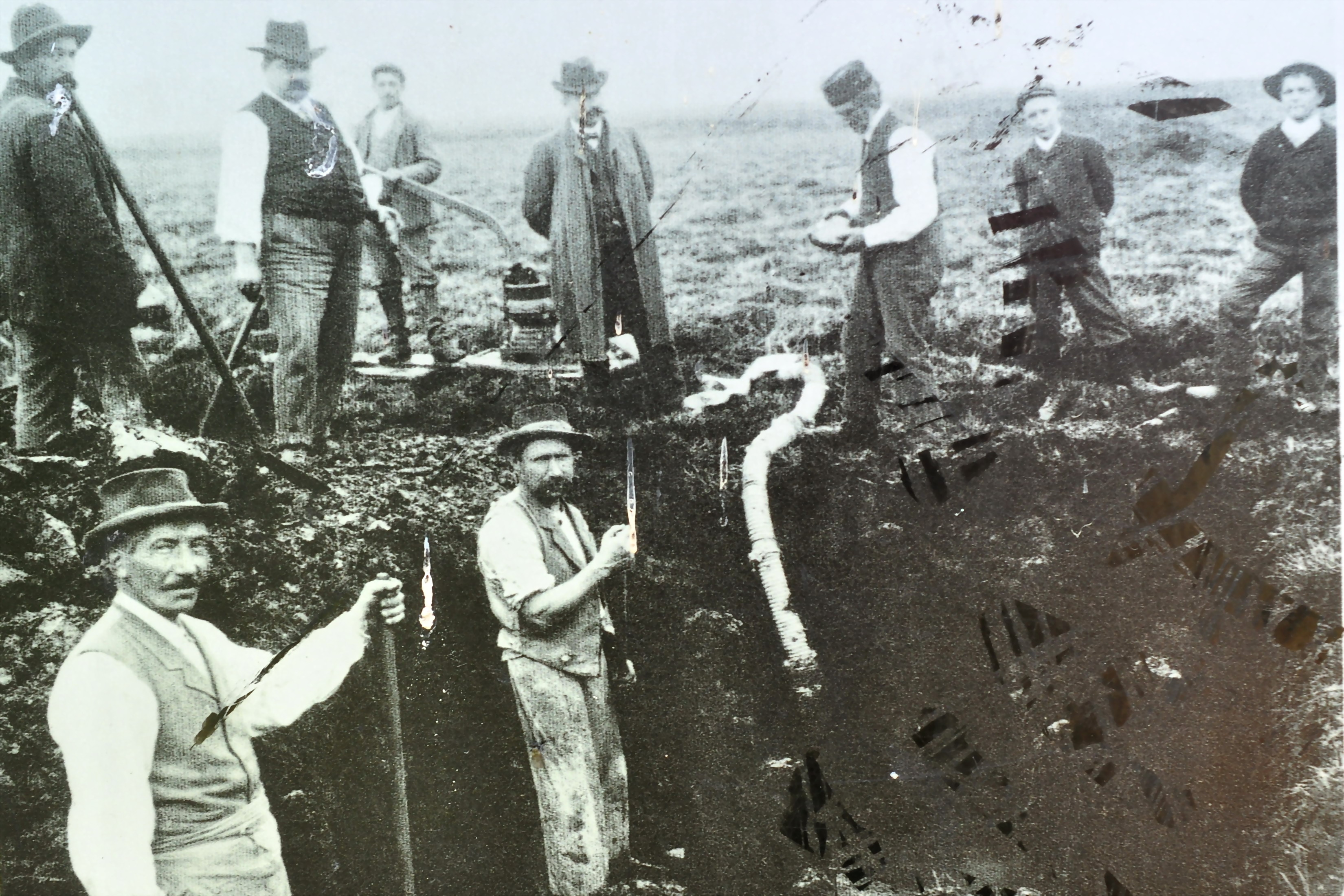 Jakob Messikommer, Robenhausen in Wetzikon (Switzerland) : Ausgrabungarbeiten im Robenhauserriet.